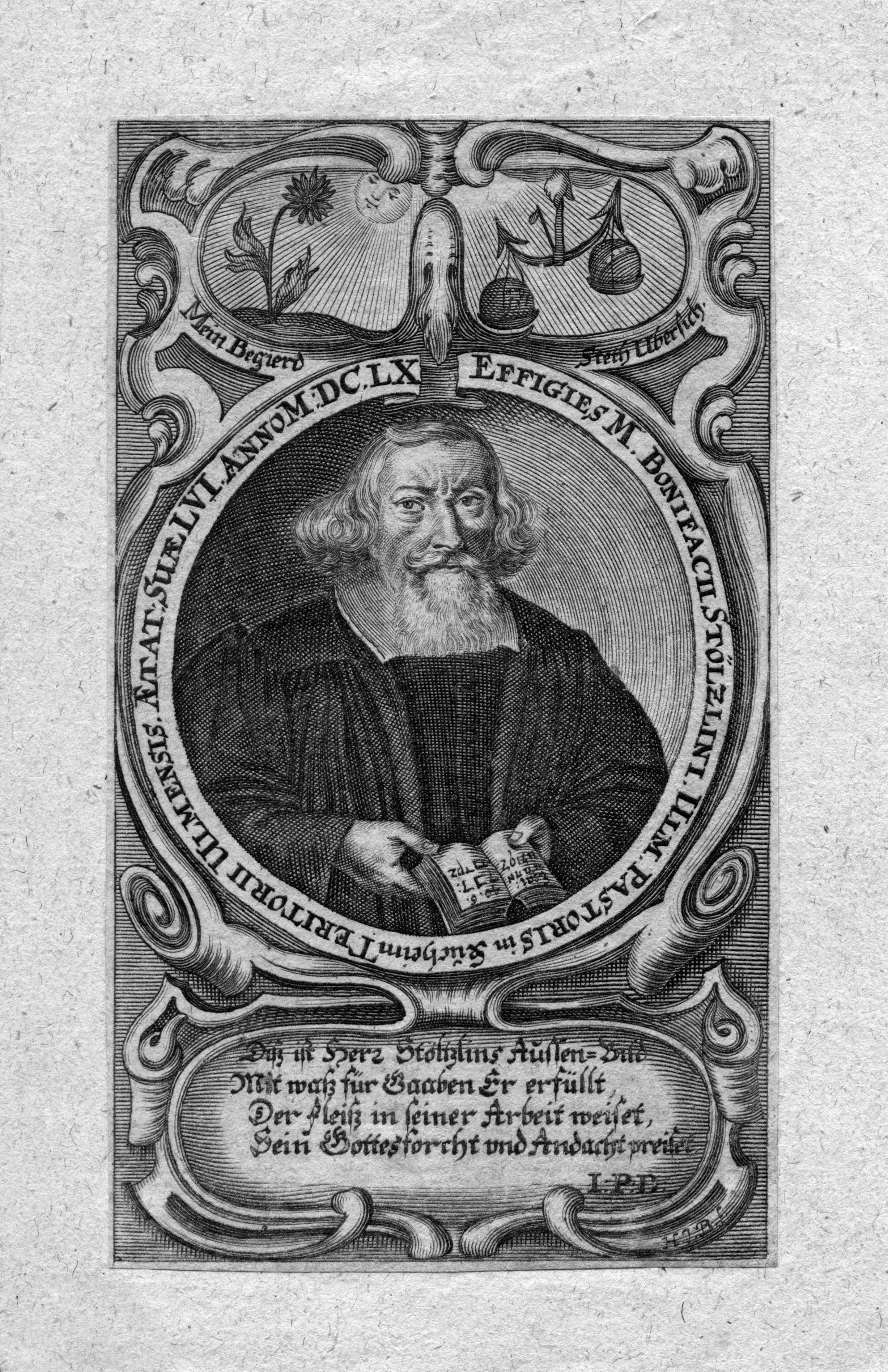 portrait gravé